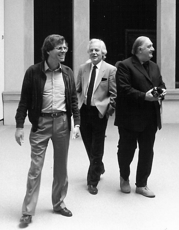 Christian von Holst und Peter Beye mit dem Architekten James Stirling kurz nach der Eröffnung der Neuen Staatsgalerie in Stuttgart